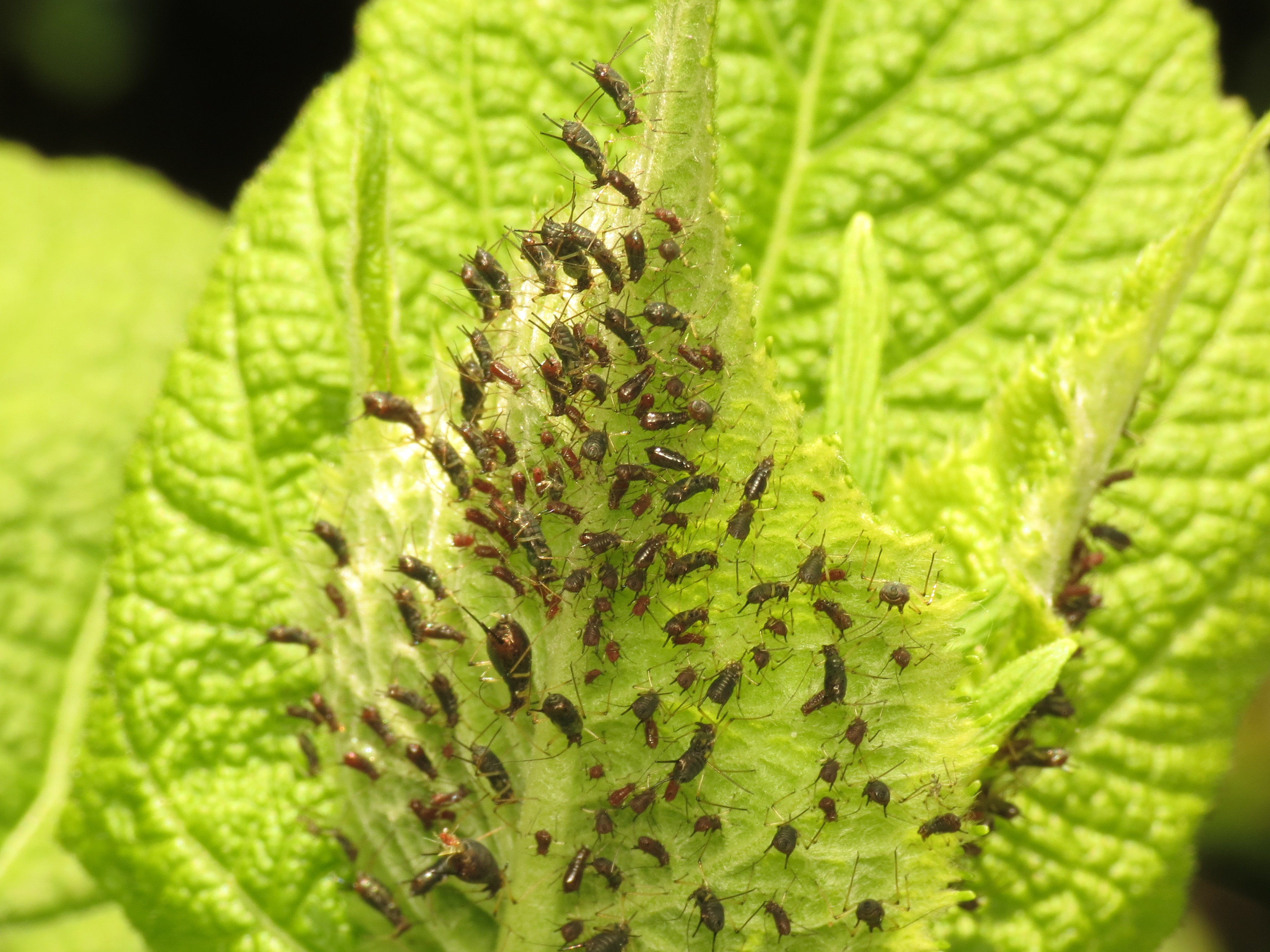 Uroleucon telekiae (Holman, 1965), on Telekia speciosa Schreb. (Baumg.), Søborg, Denmark, 1 June 2014